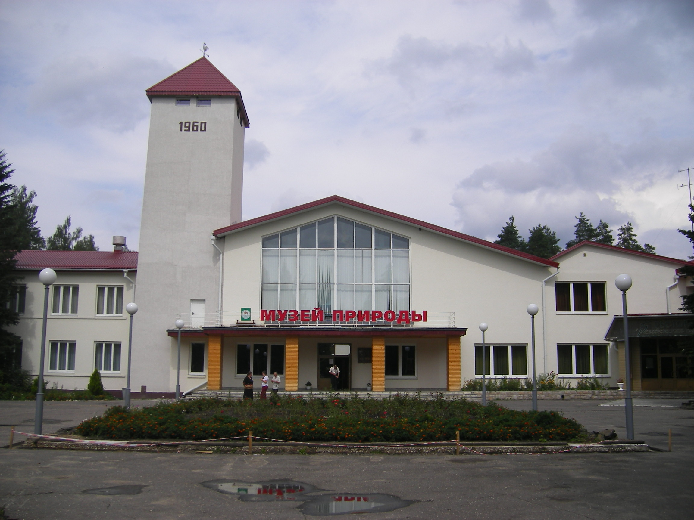 Museum of Nature, Kamyanyuki